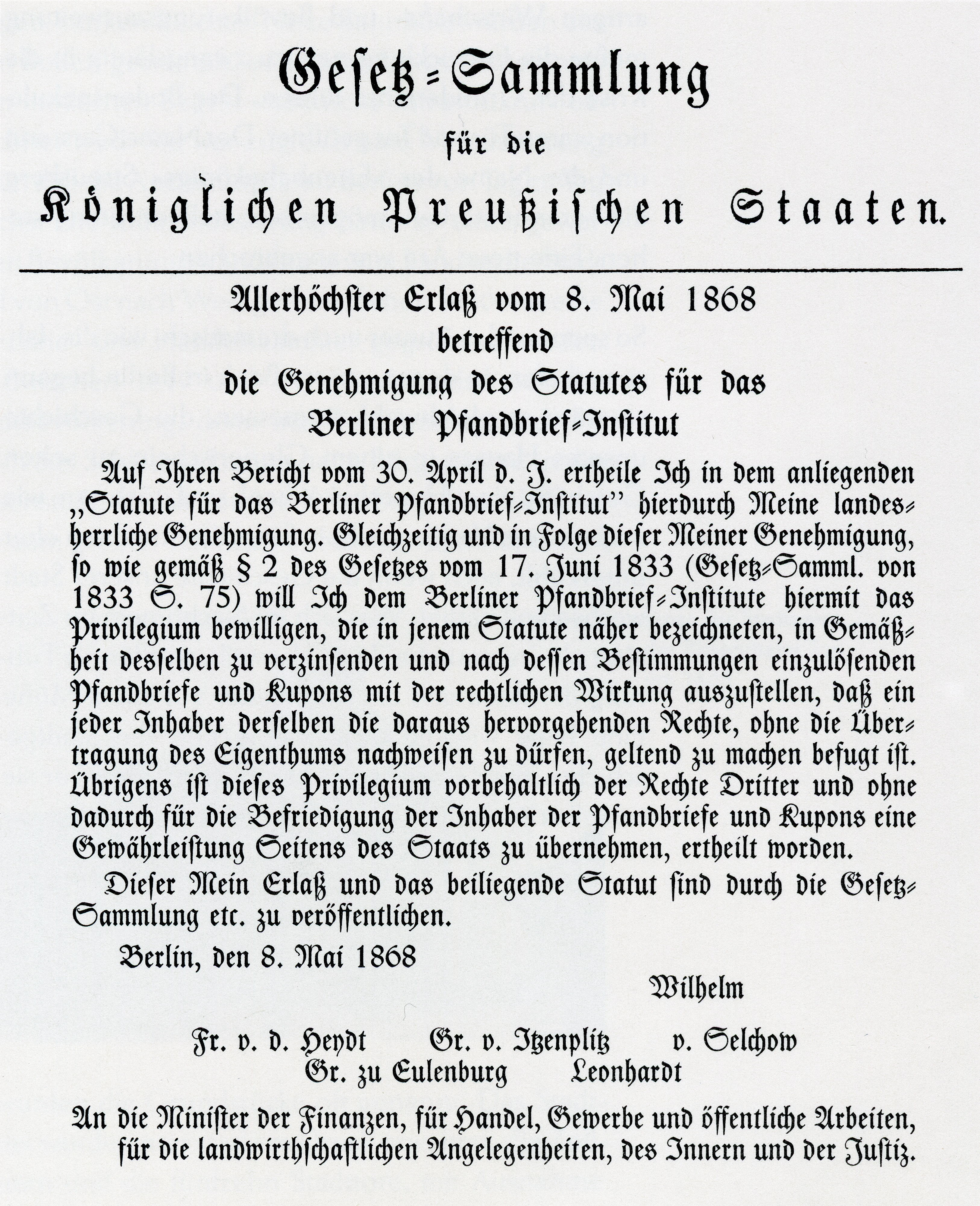 Gründungsurkunde, Erlaß in Gesetzessammlung von 1868 S. 450/51